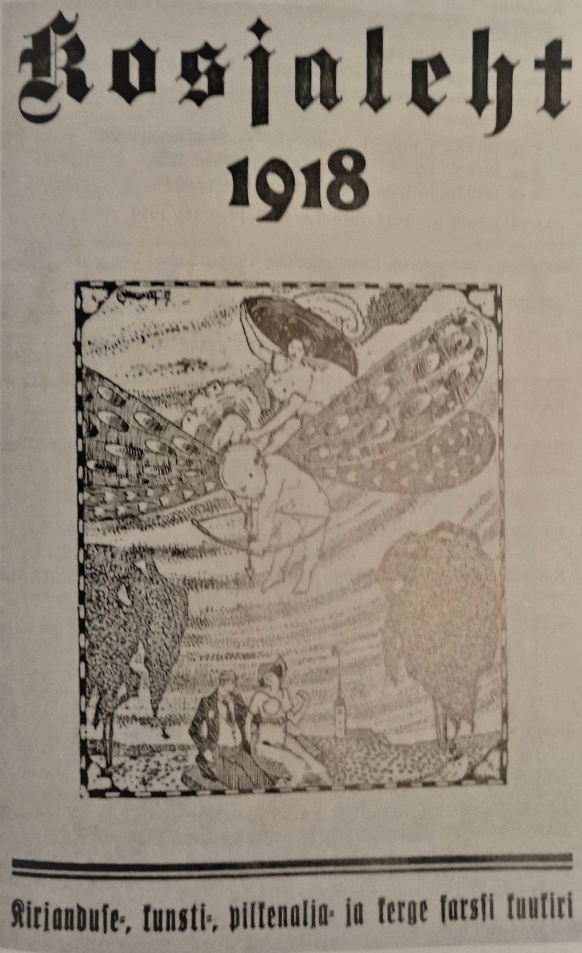 Kosjaleht